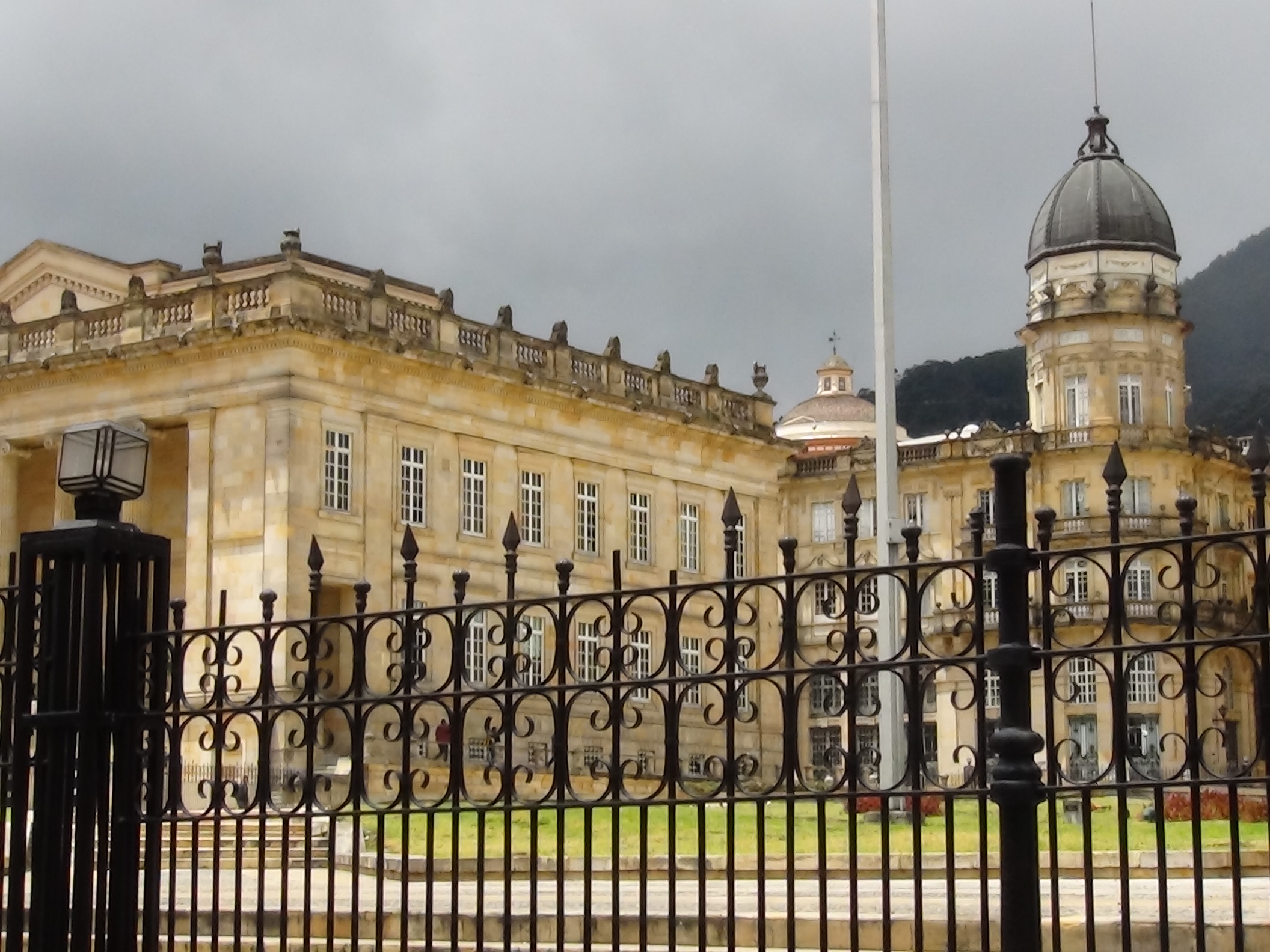 Torreón de la Bandera y Cúpula del Colegio Mayor de San Bartolomé.